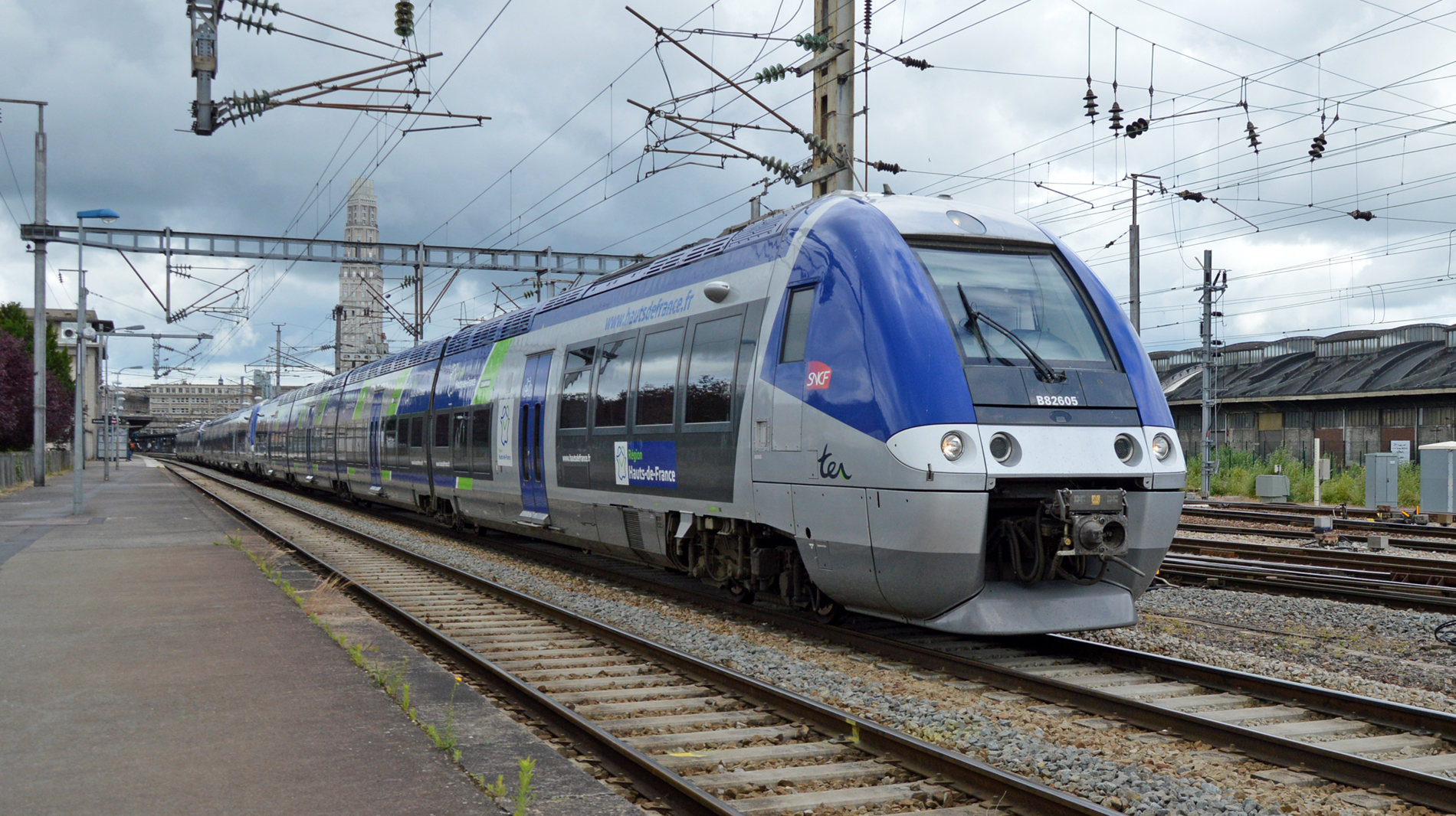 B 82606/07 + B 82669/70 + B 82688/90 à Amiens